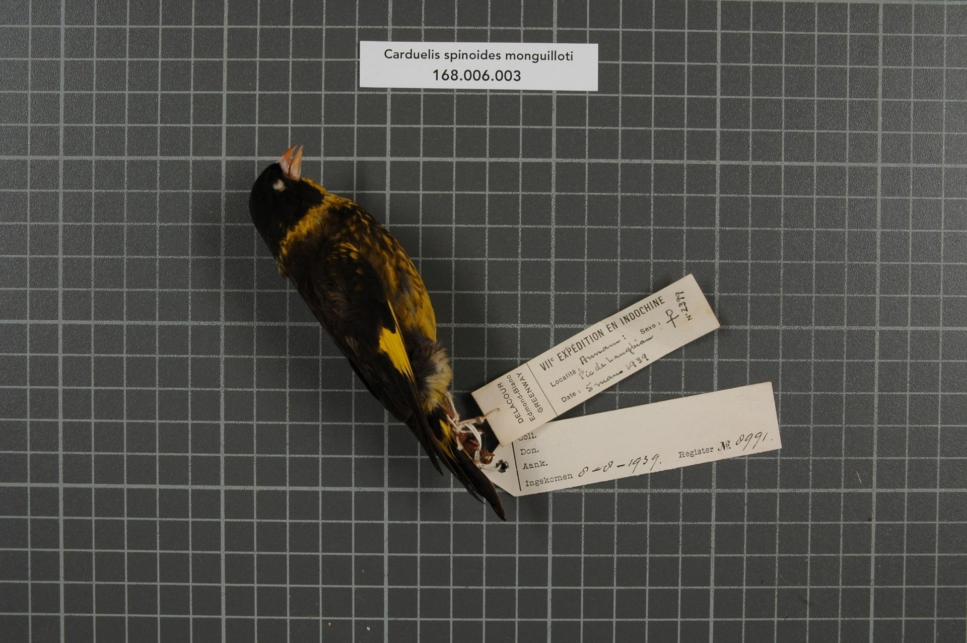 Carduelis spinoides monguilloti (Delacour, 1926)